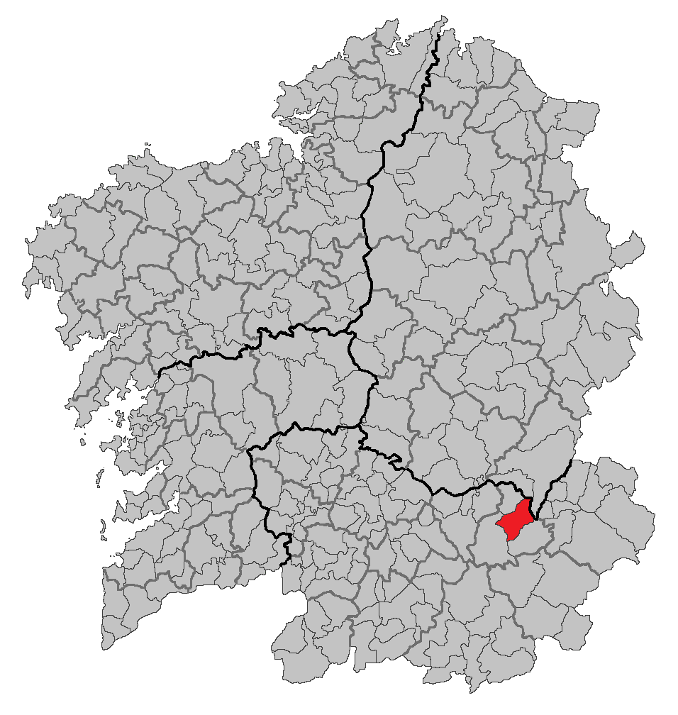 Mapa coa localización do concello de A Pobra de Trives.